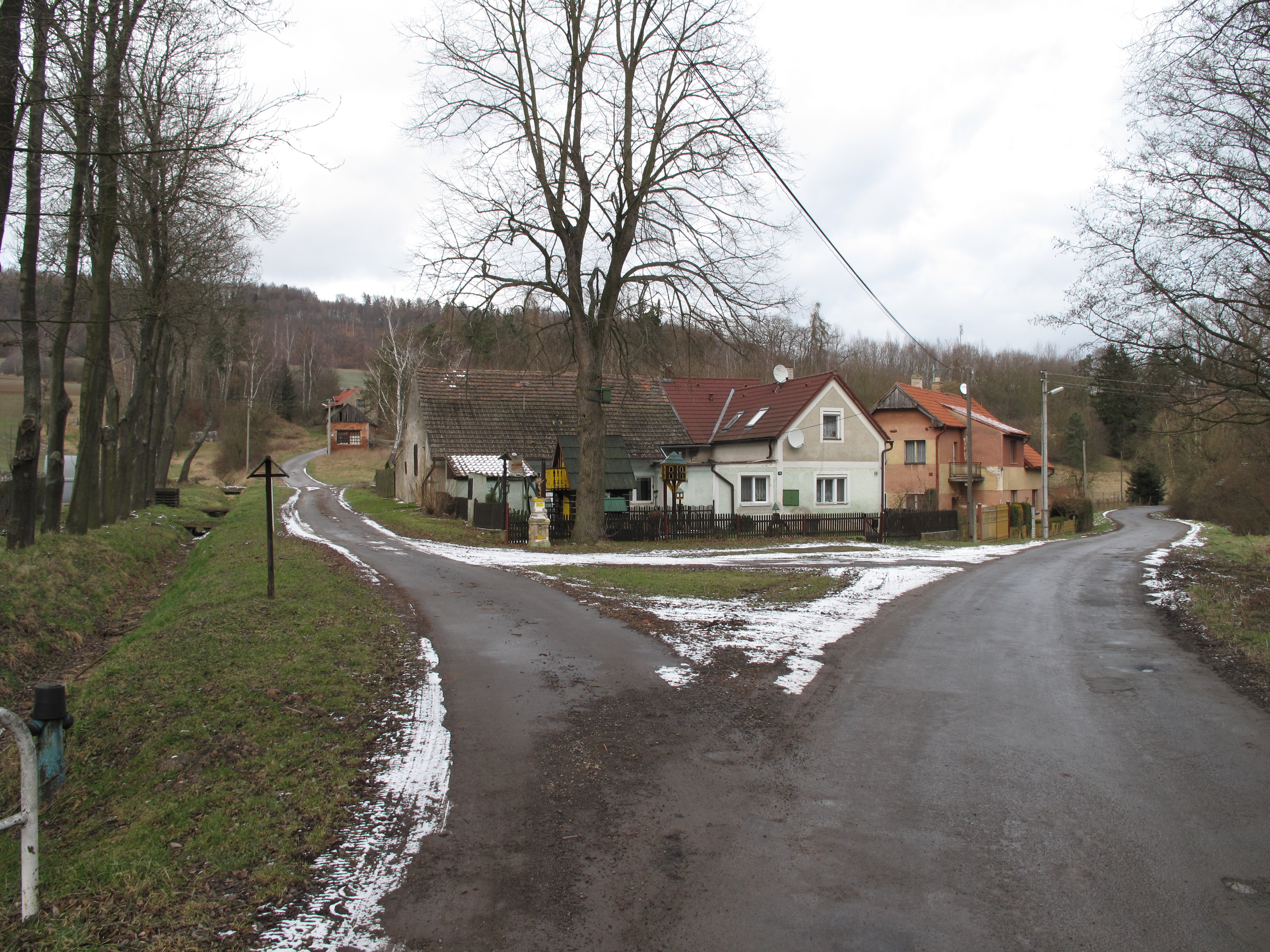 Rozcestí v Bdíně. Okres Rakovník, Česká republika.